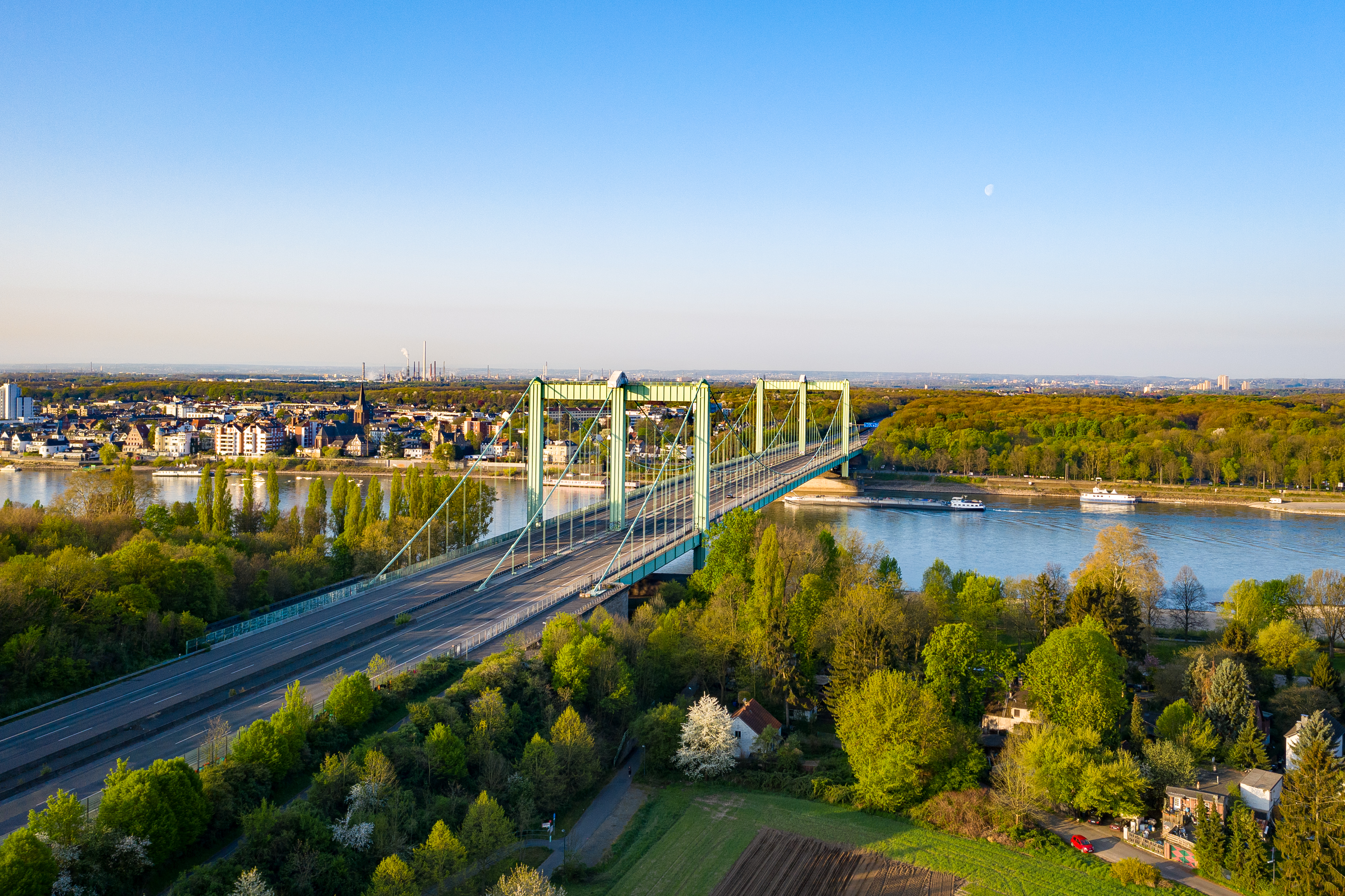 Rodenkirchener Autobahnbrücke, Blick von der rechtsrheinischen Seite.